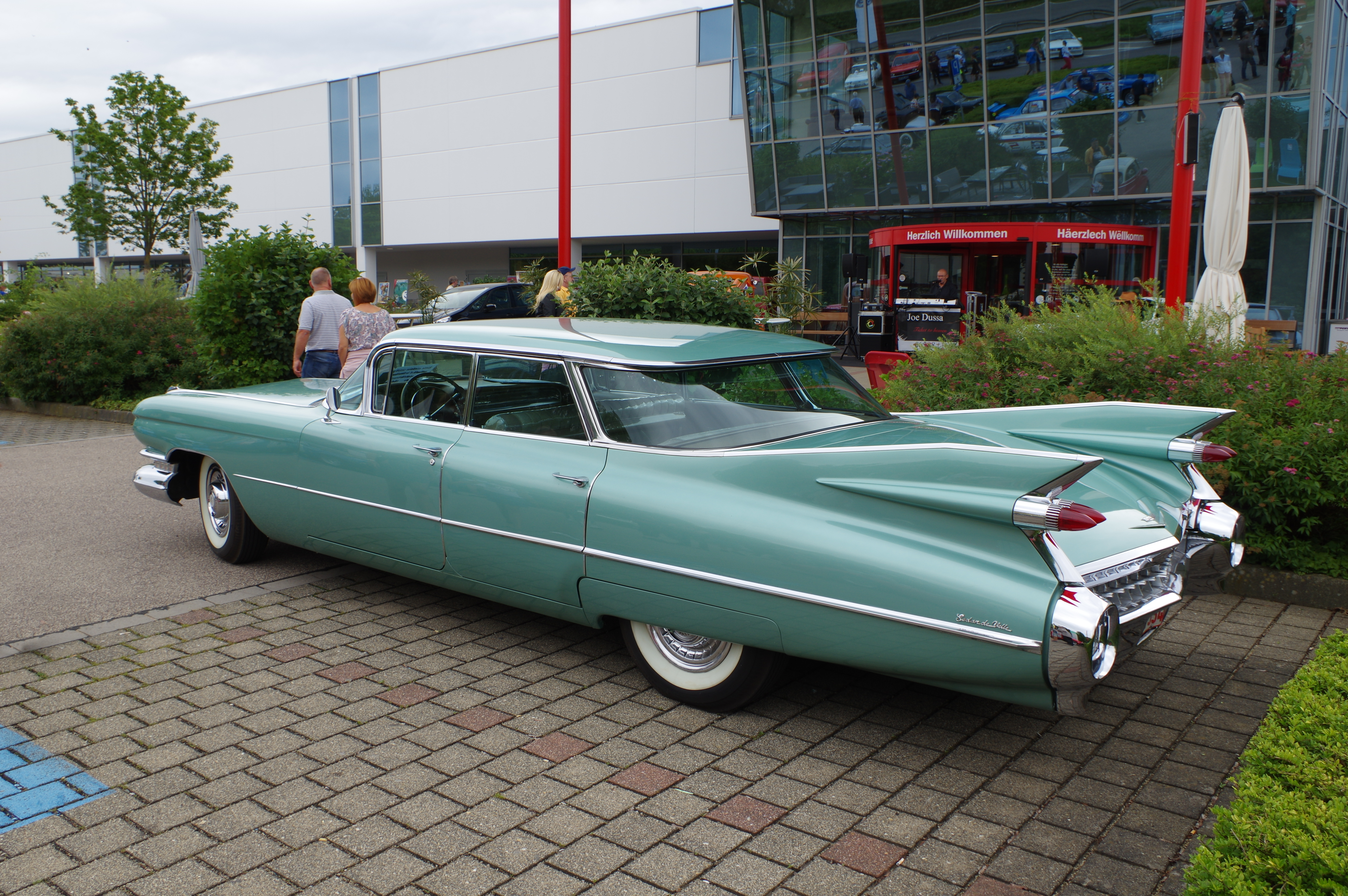 Cadillac Sedan de Ville mit Flattop und Panorama Heckscheibe, 1959, 325 PS